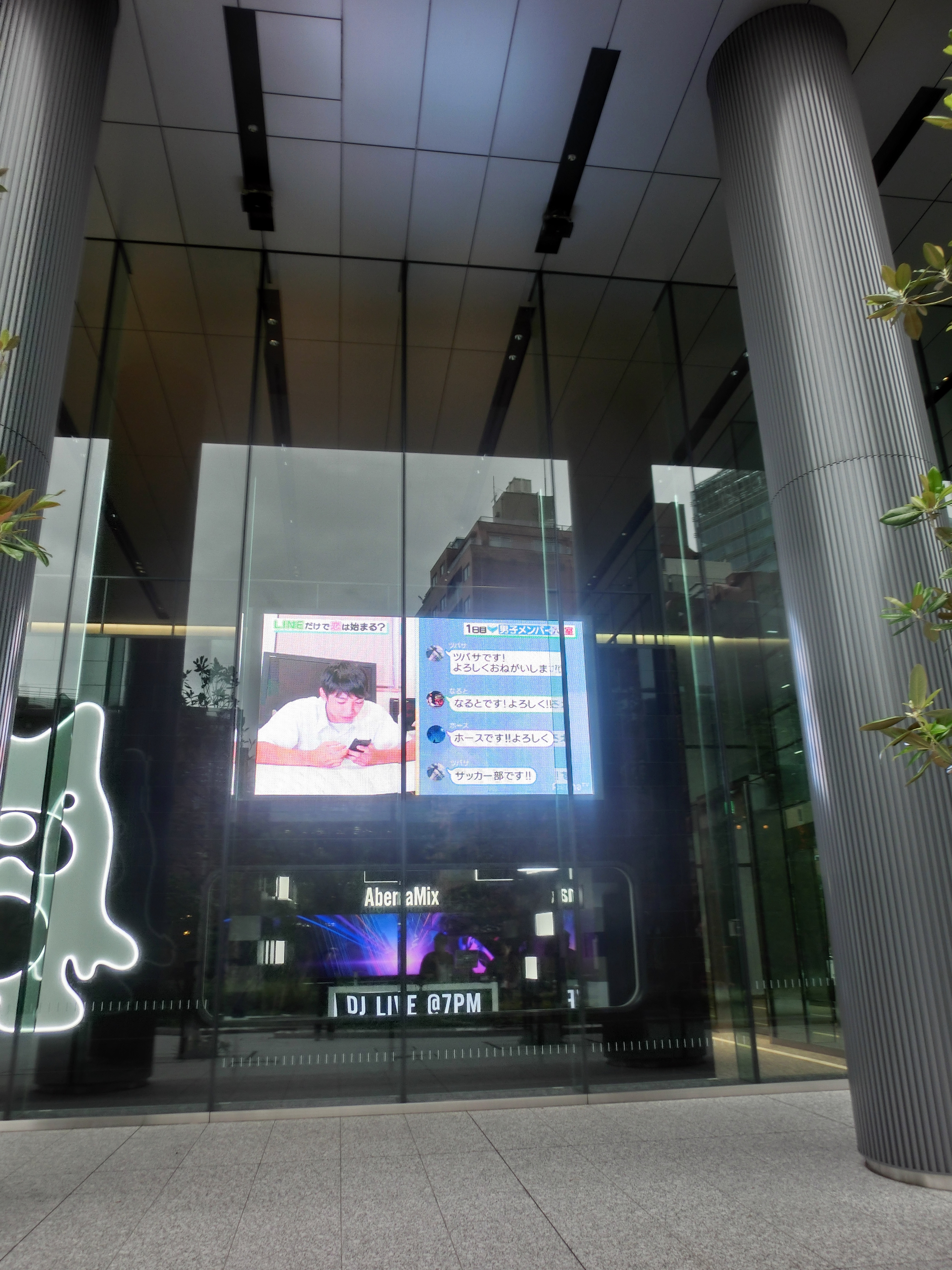 SHIBUYA ABEMAタワーズ